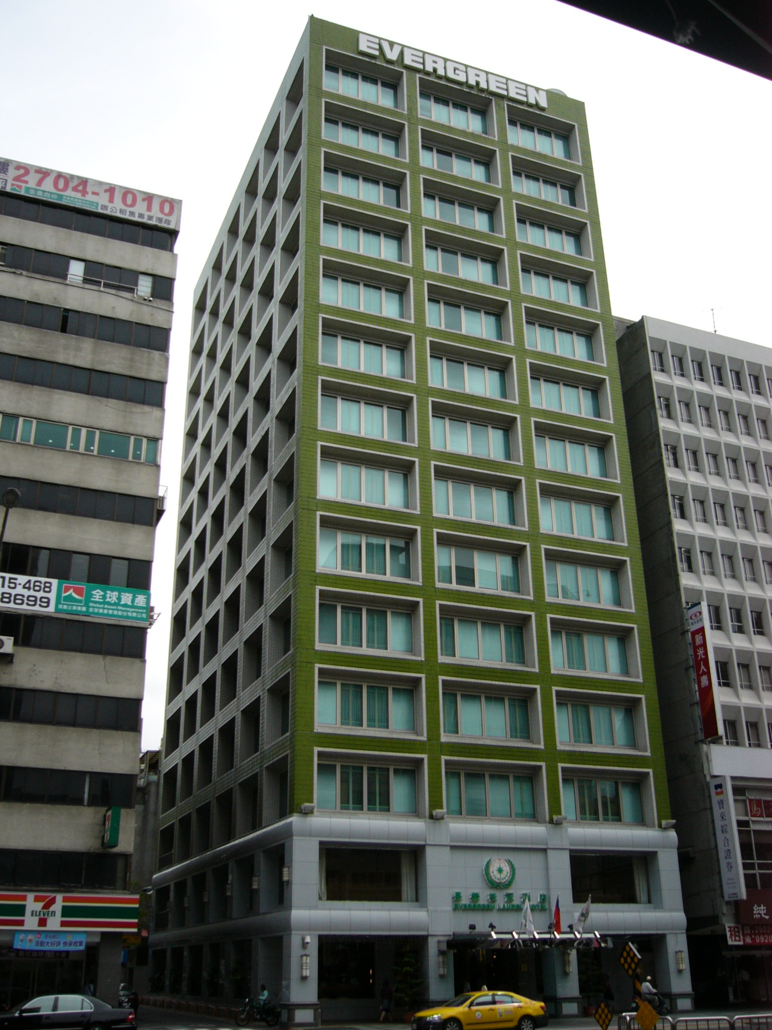 中文（台灣）: 長榮桂冠酒店（台北）正面外觀。